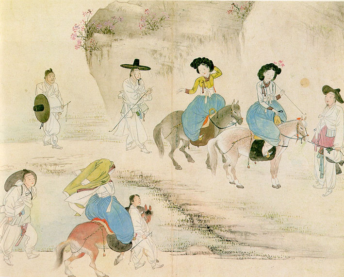 연소답청 (年少踏靑) '혜원풍속도첩 (蕙園風俗圖帖)' 중에서, 서울 성북구 간송미술관 소장